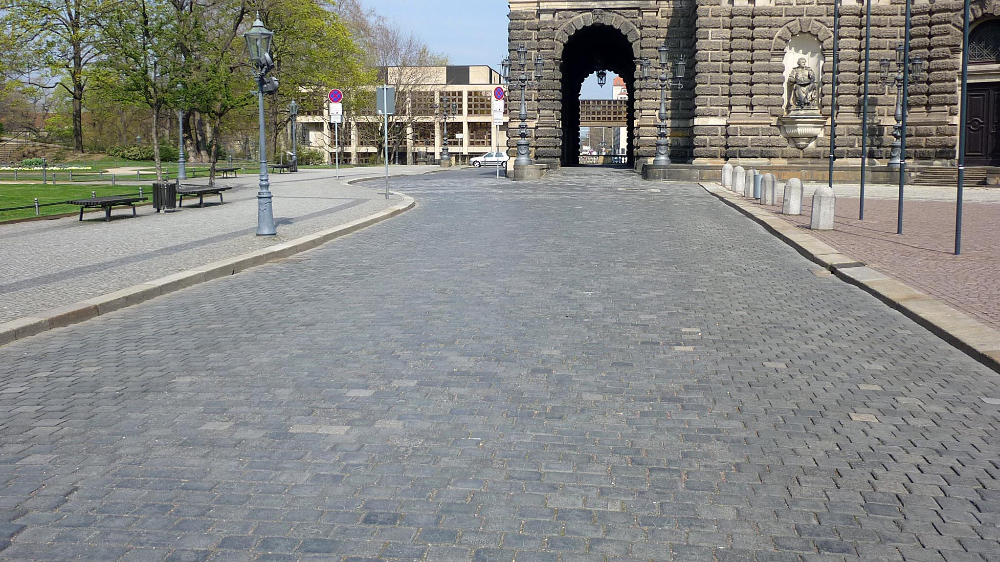 Kupferschlackepflaster am Theaterplatz in Dresden